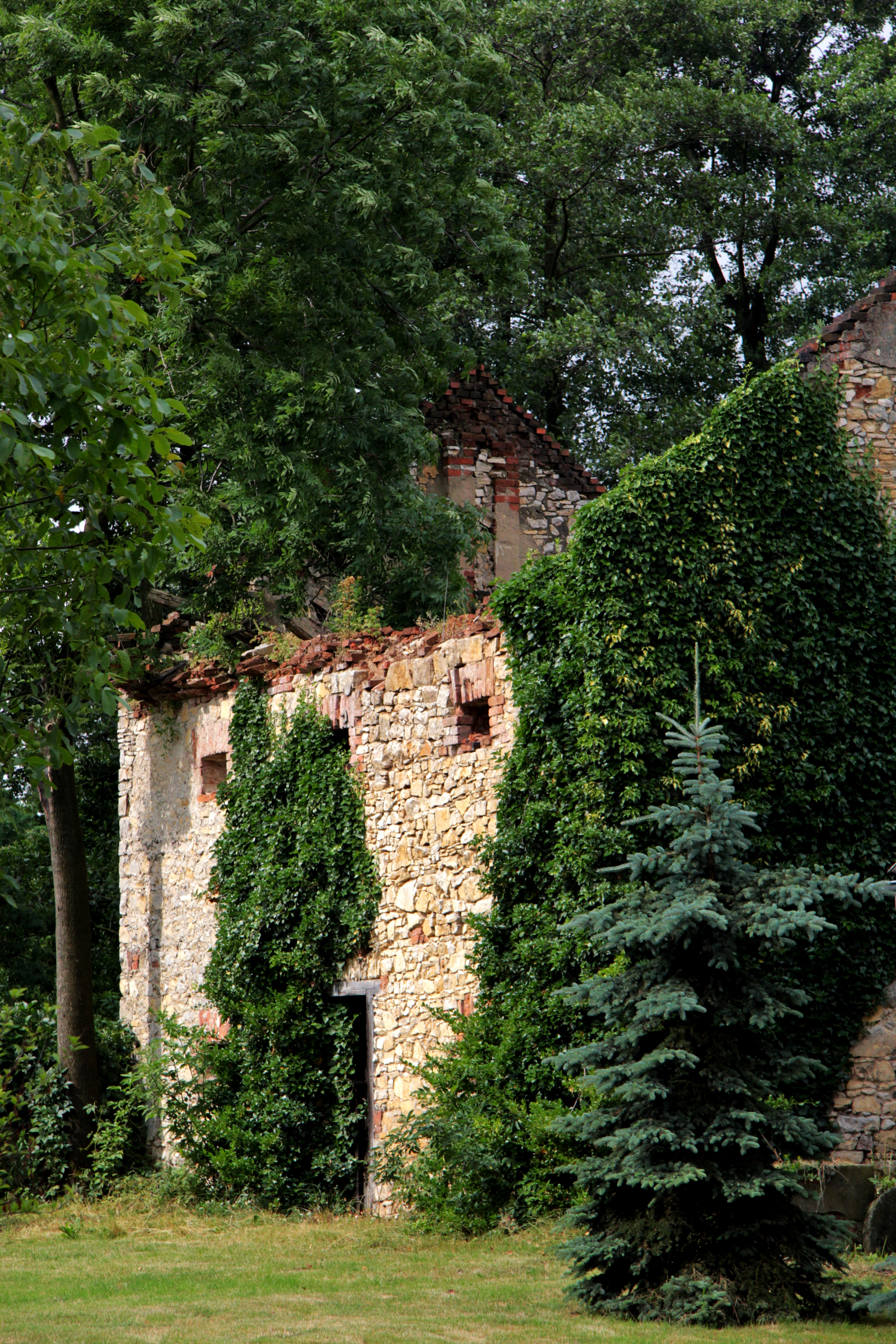 Wiśnicze, spichrz plebański, poł. XIX w.